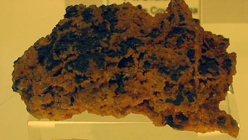 Fotografía de Pablo Alberto Salguero Quiles, realizada en el museo geominero de Madrid (España)